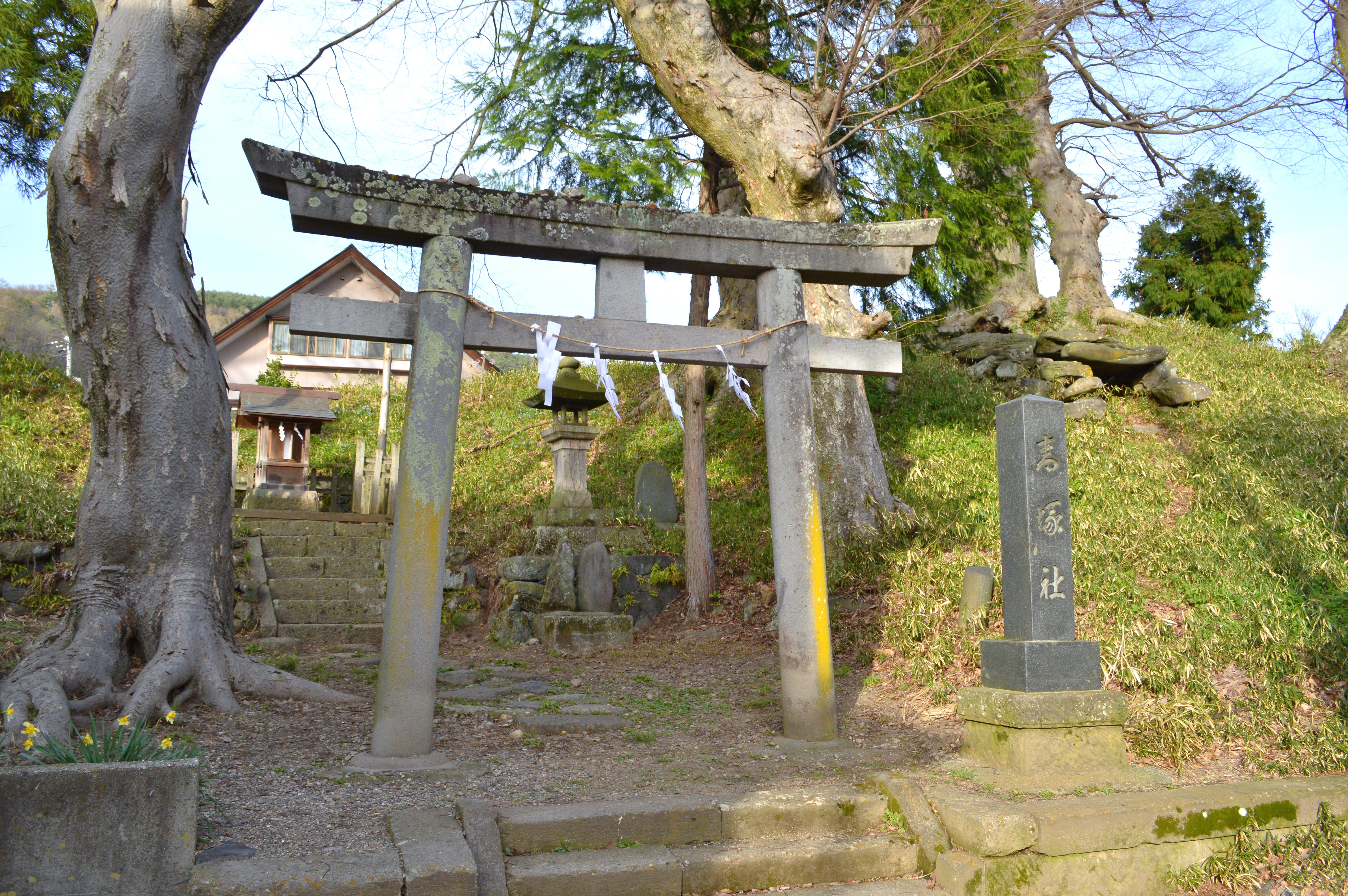 下諏訪青塚古墳 青塚社と石室